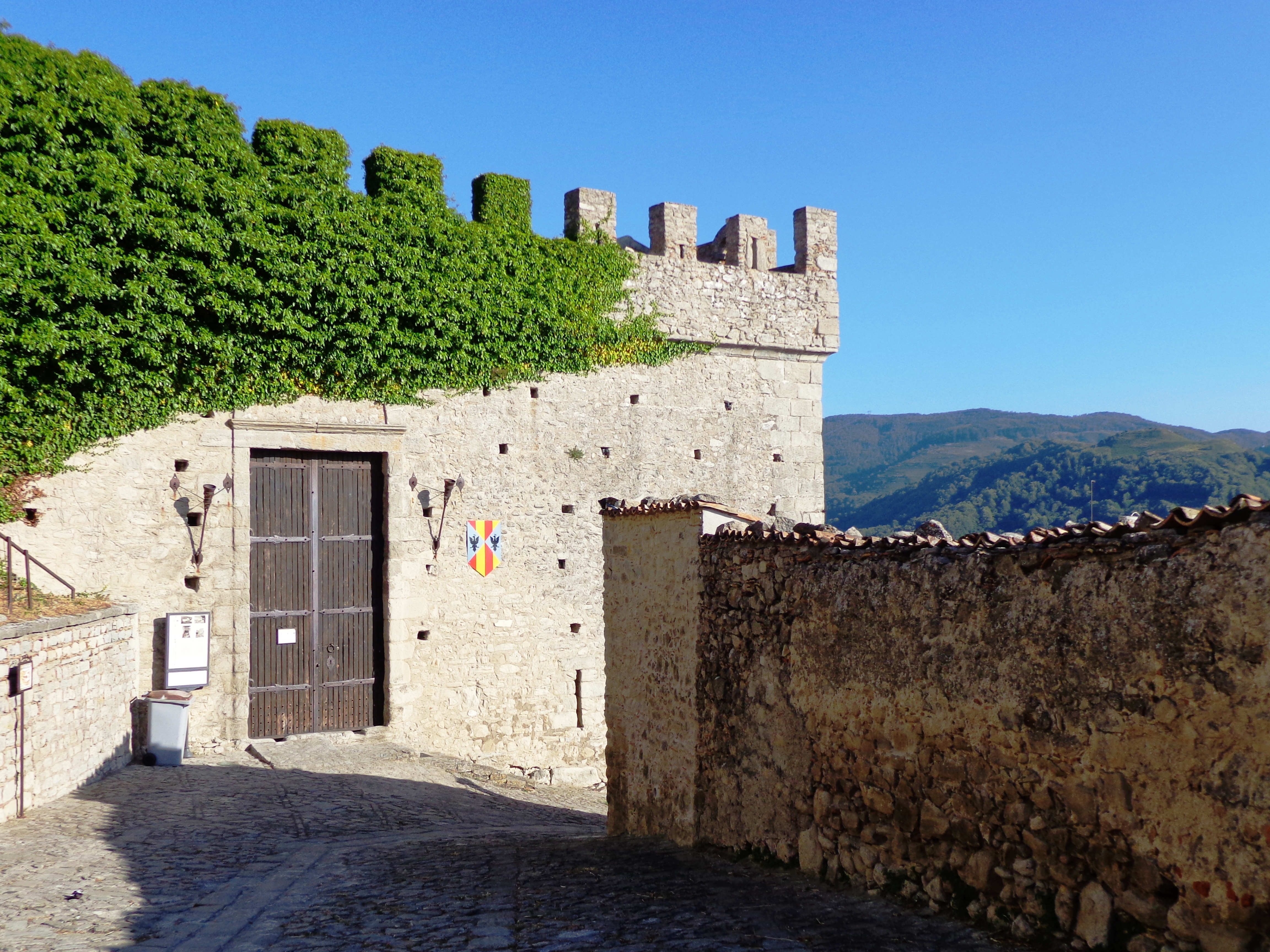 Castello di Montalbano Elicona lato ovest - Ingresso Visitatori